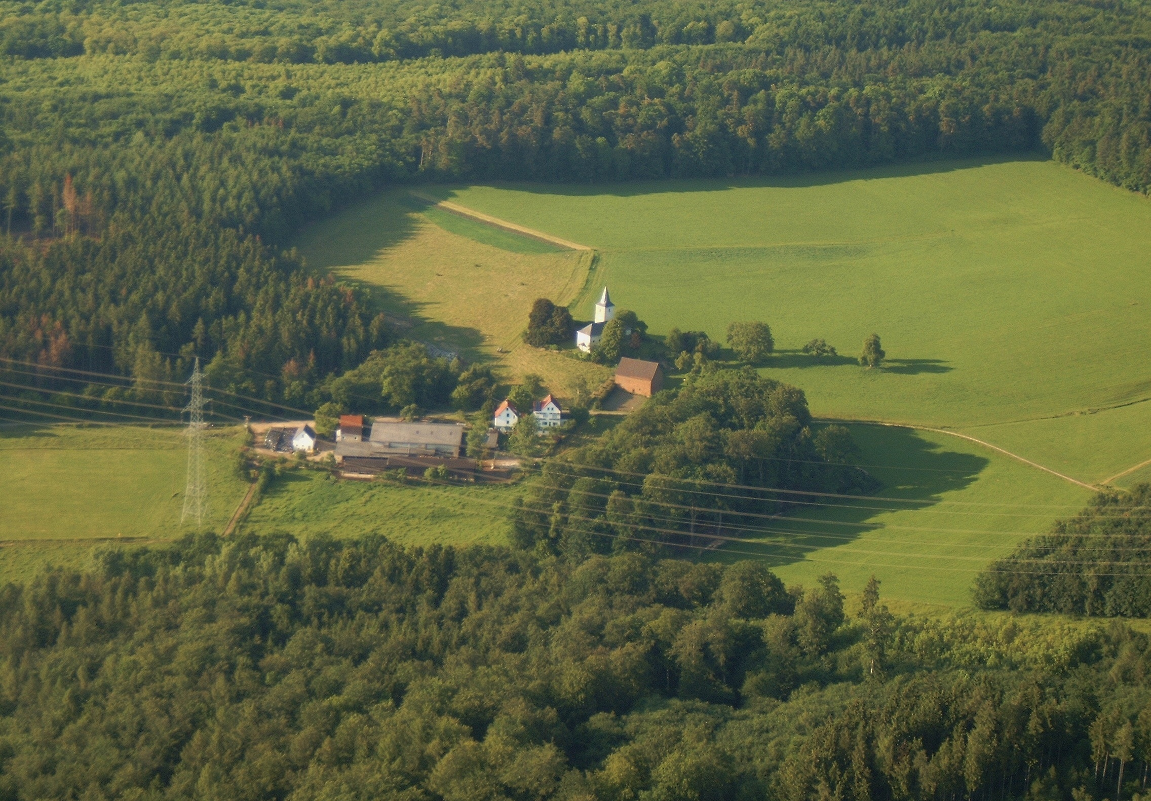 Luftaufnahme von Hof Habenscheid aus einem Heißluftballon heraus.